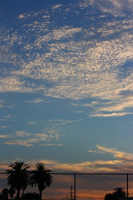 アメリカ合衆国カリフォルニア州サンディエゴ郡の巻積雲